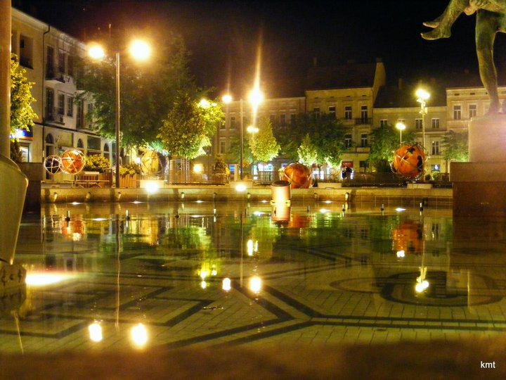 Ausstellung der Rolling Stars and Planets in szombathely Ungarn 2009